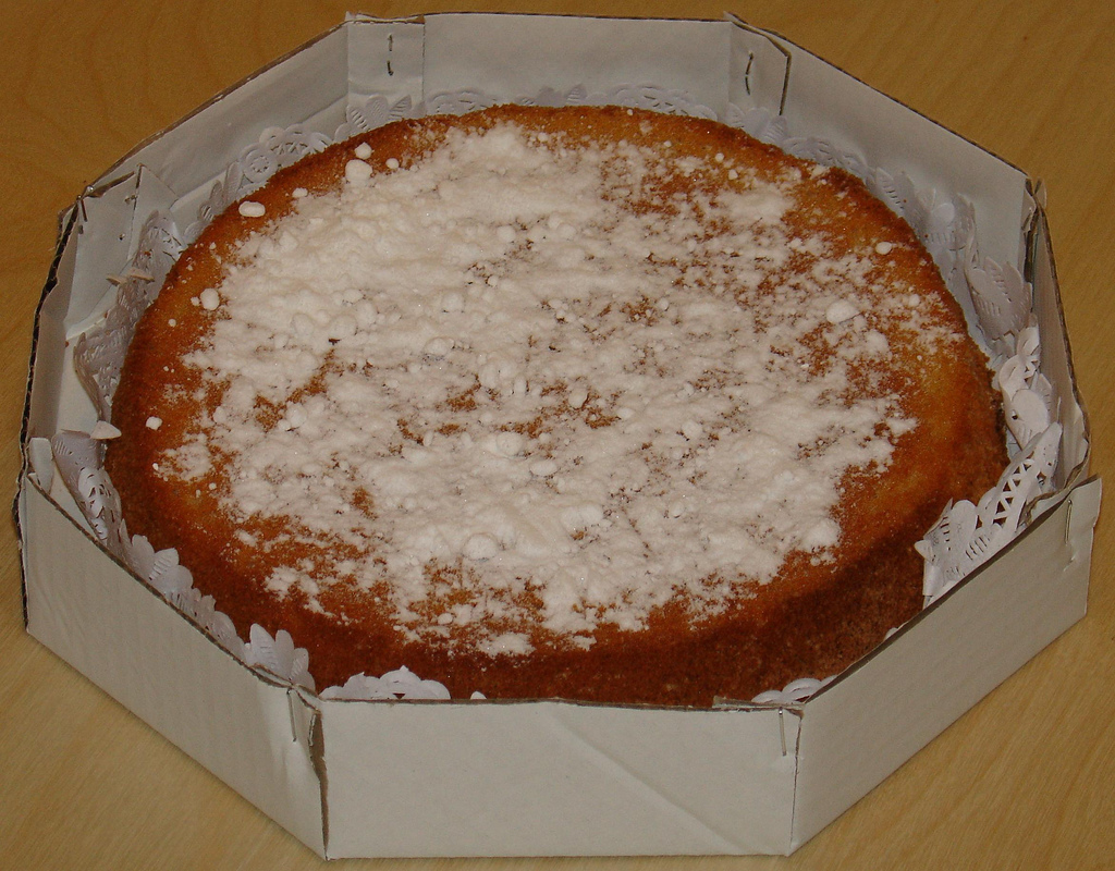 Postre típic de l'illa de Mallorca. El gató és un pastís típic mallorquí, amb origen a Valldemossa, on l'ingredient principal és l'ametlla.